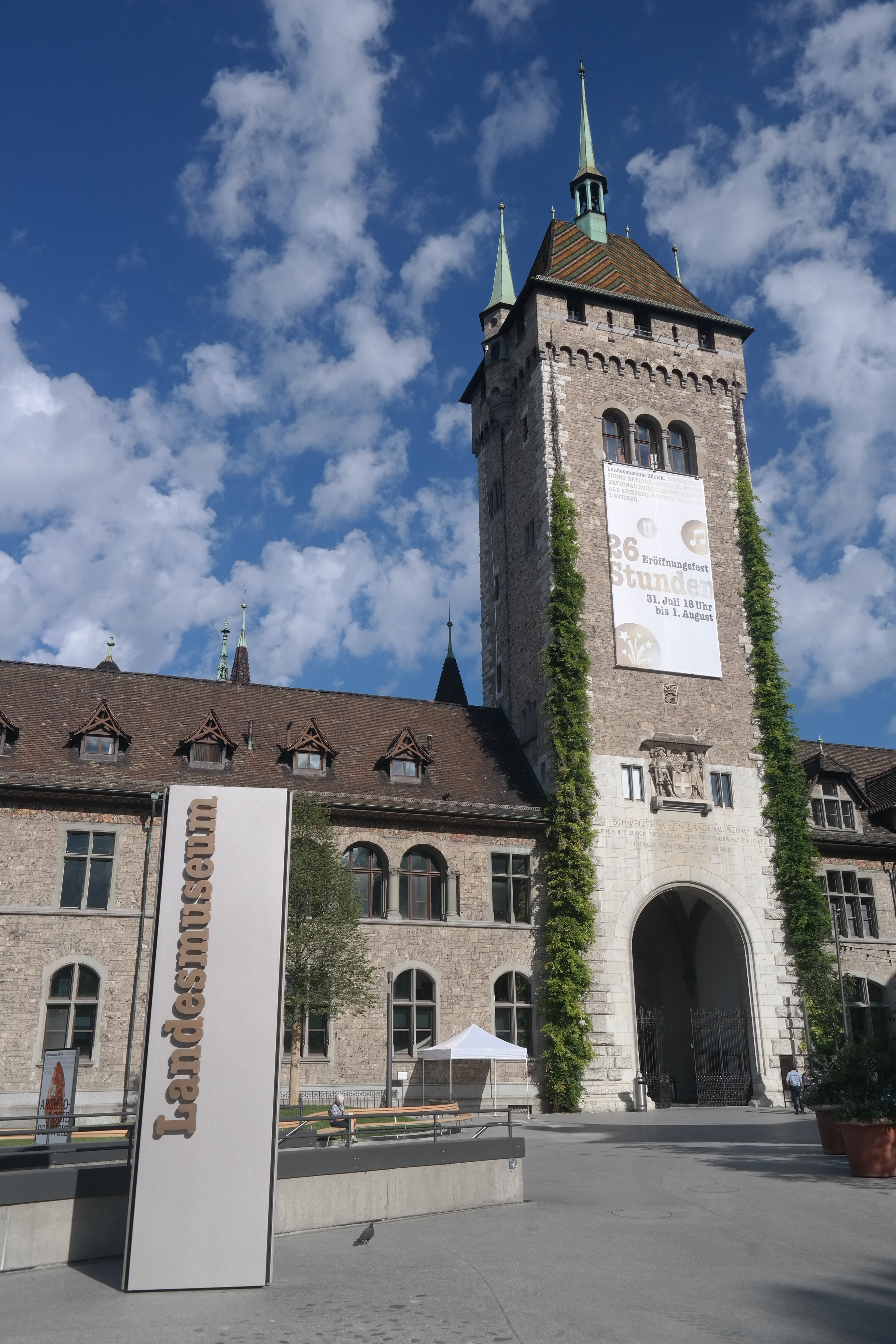 Eingangsbereich des Schweizerischen Landesmuseums in Zürich anlässlich der Eröffnung des Erweiterungsbaus 2016